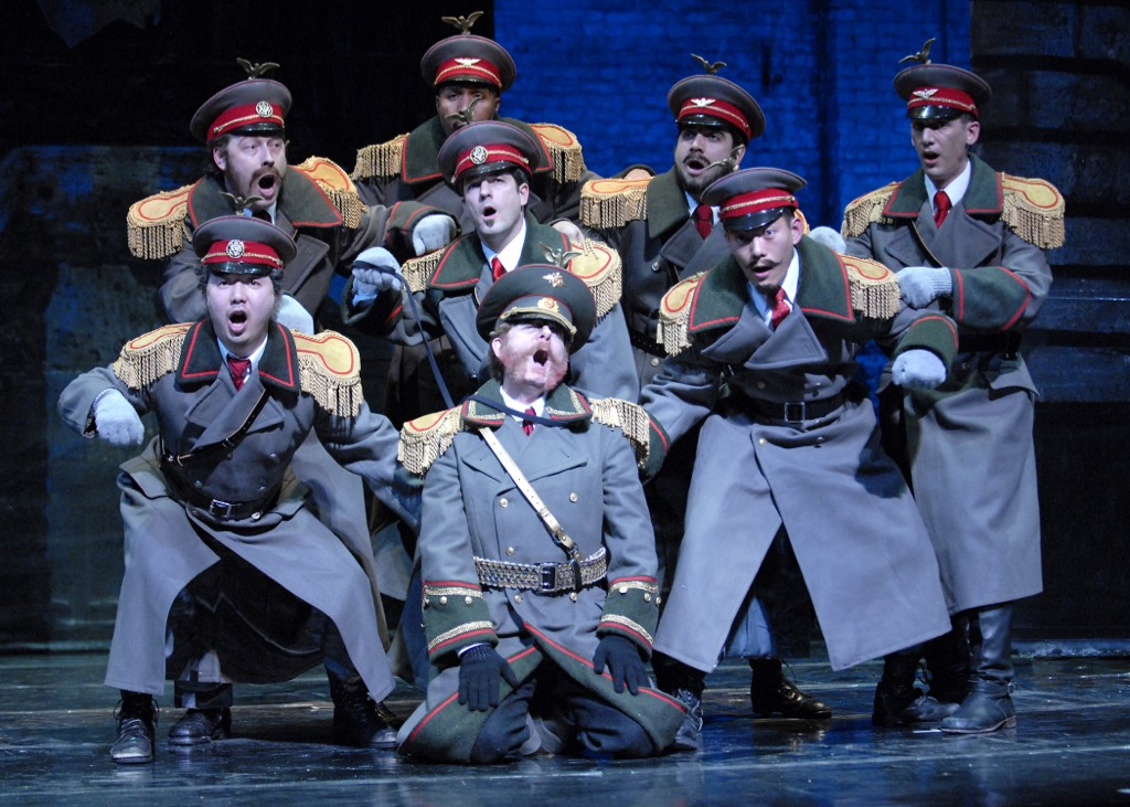 האופרה האף